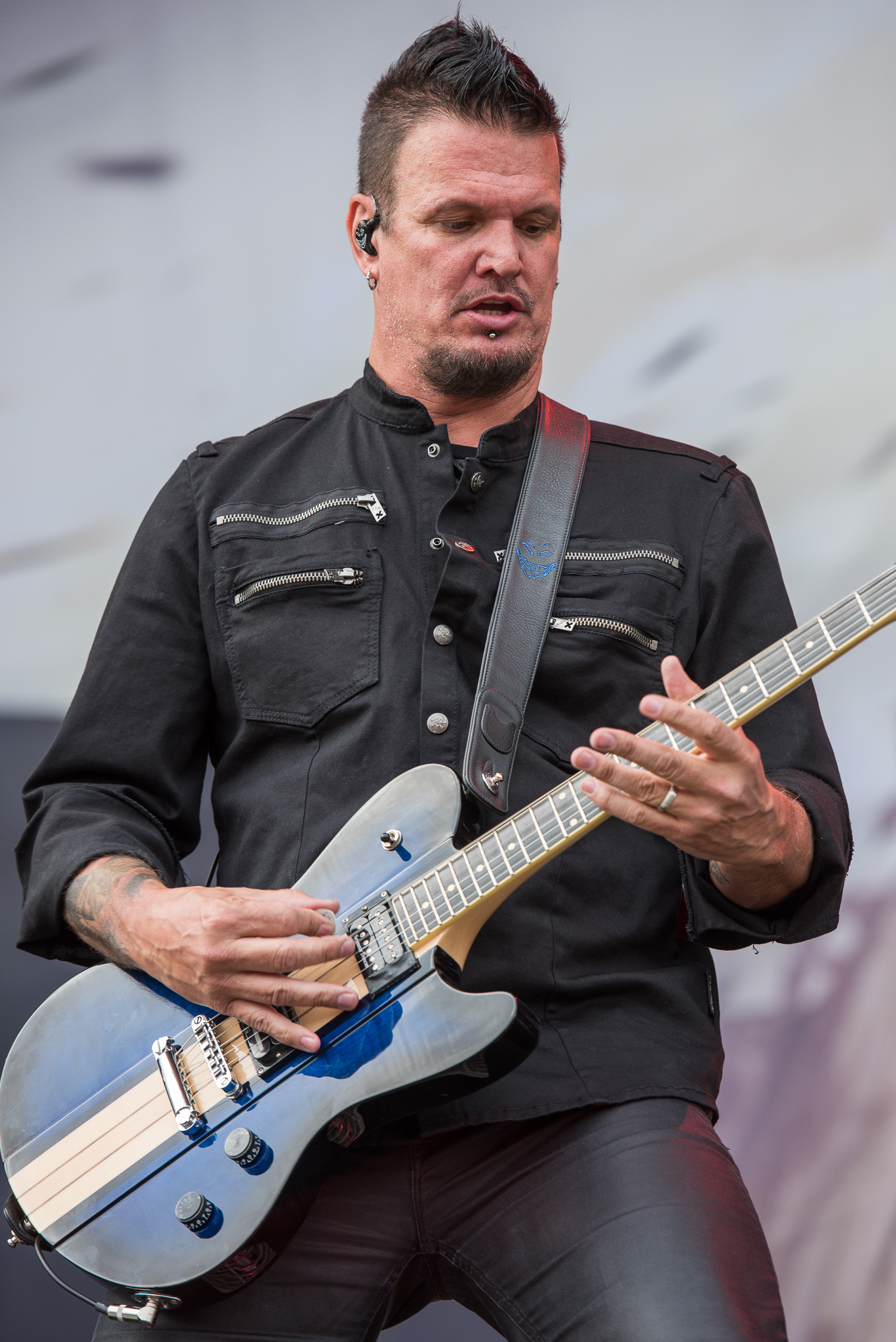 ARGO-Konzerte,Dan Donegan,Disturbed,Festival,Konzert,Livekonzert,Livemusik,Musik,RiP,Rock im Park 2016,Seat Zeppelin Stage